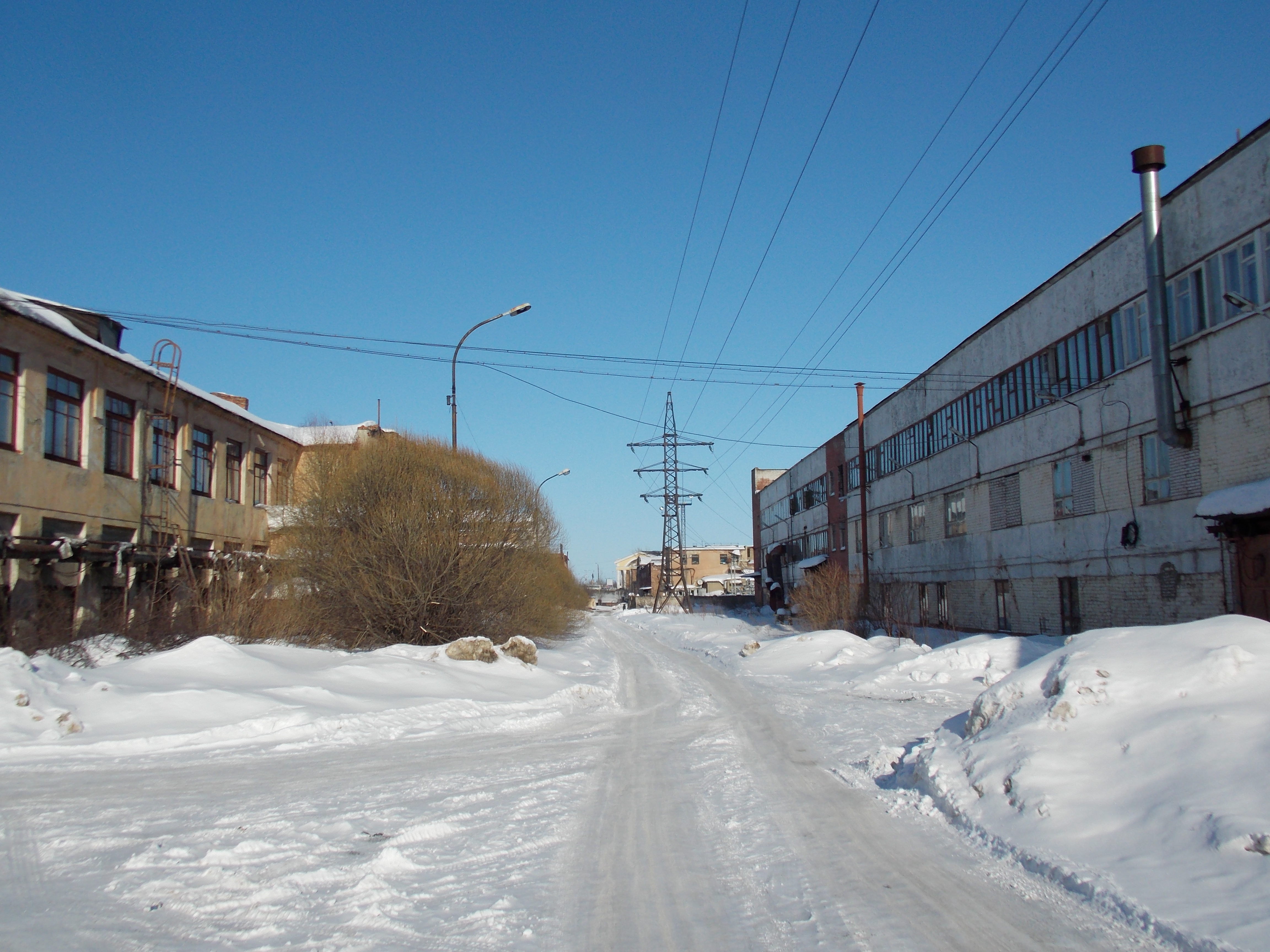 На первой площадке ОТЗ